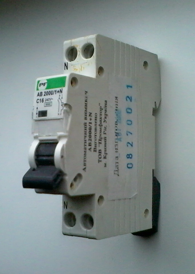 Знято мобілкою Самсунг